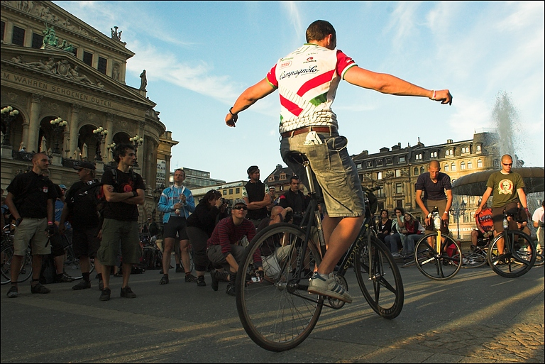 Trackstand, DMFK Frankfurt 2007